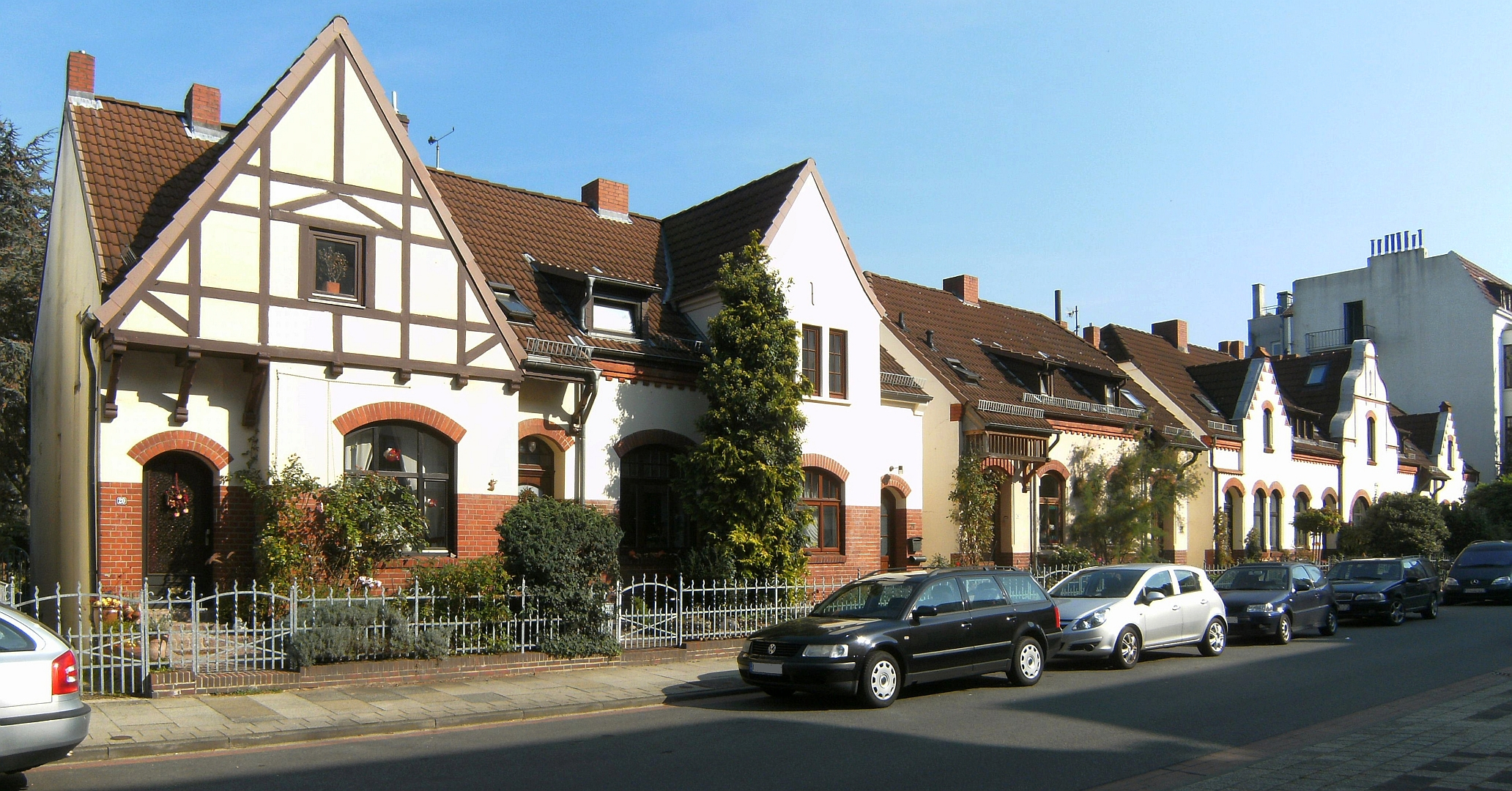 Eugen-Kulenkamp-Stiftung in Bremen, Henriettenstr 20-38. Die Denkmalgruppe ist ein geschütztes Kulturdenkmal in der Freien Hansestadt Bremen, mit der Nr. 0077 beim Landesamt für Denkmalpflege registriert.